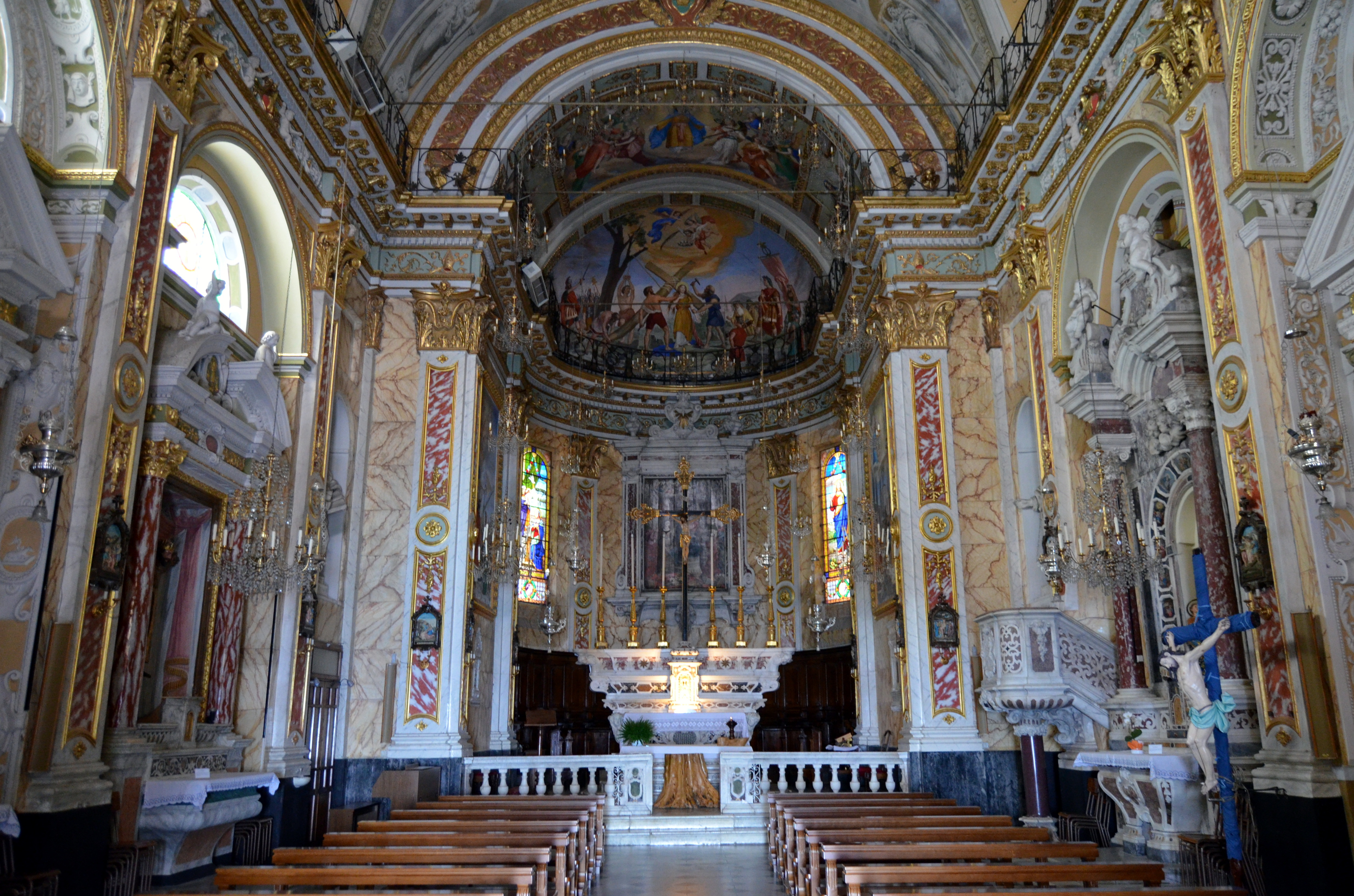 Serie di immagini della chiesa di Santa Giulia di Centaura, Santa Giulia, Lavagna, Liguria, Italia